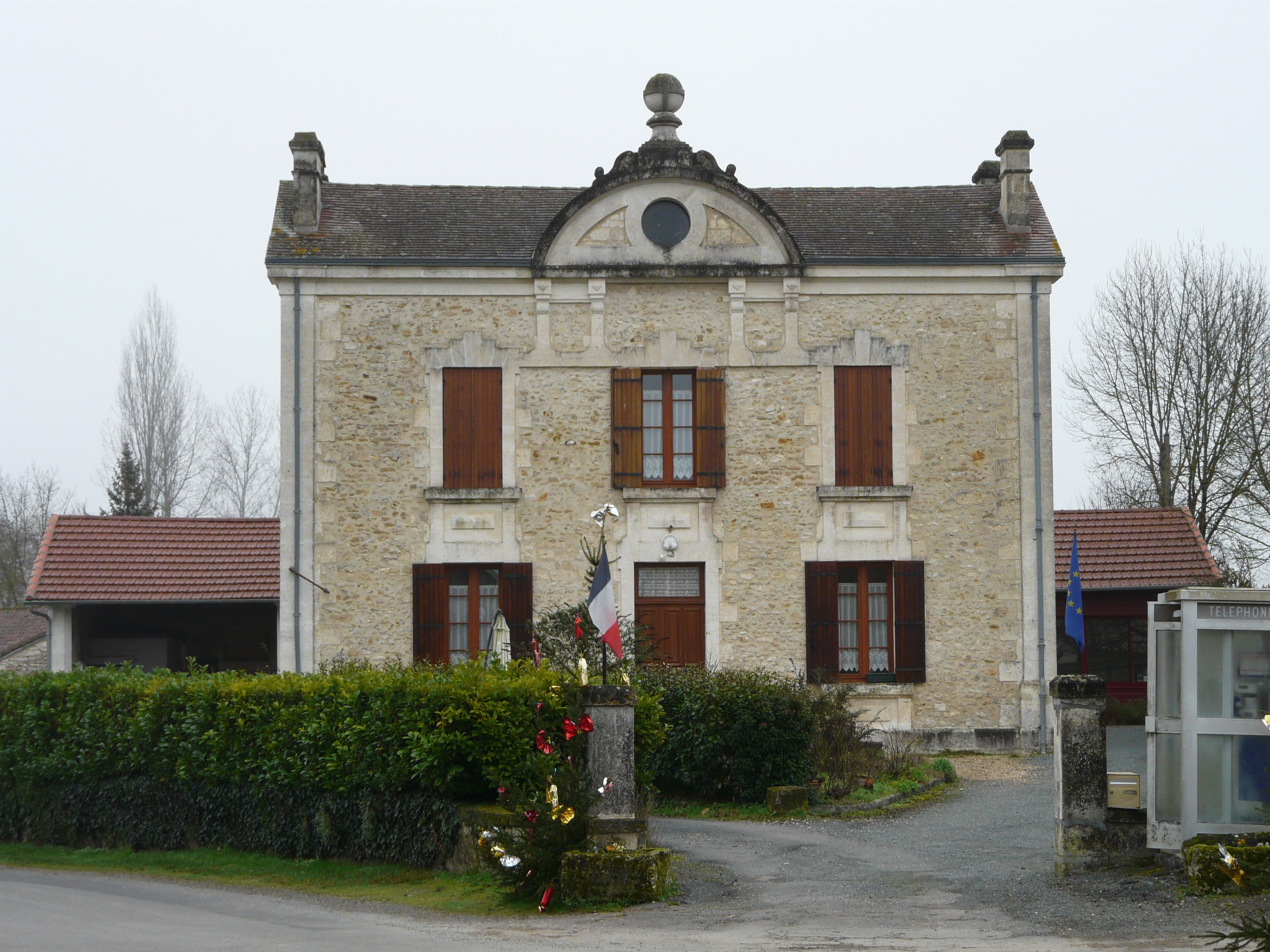 La mairie de Chapdeuil, Dordogne, France.